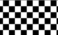 CG